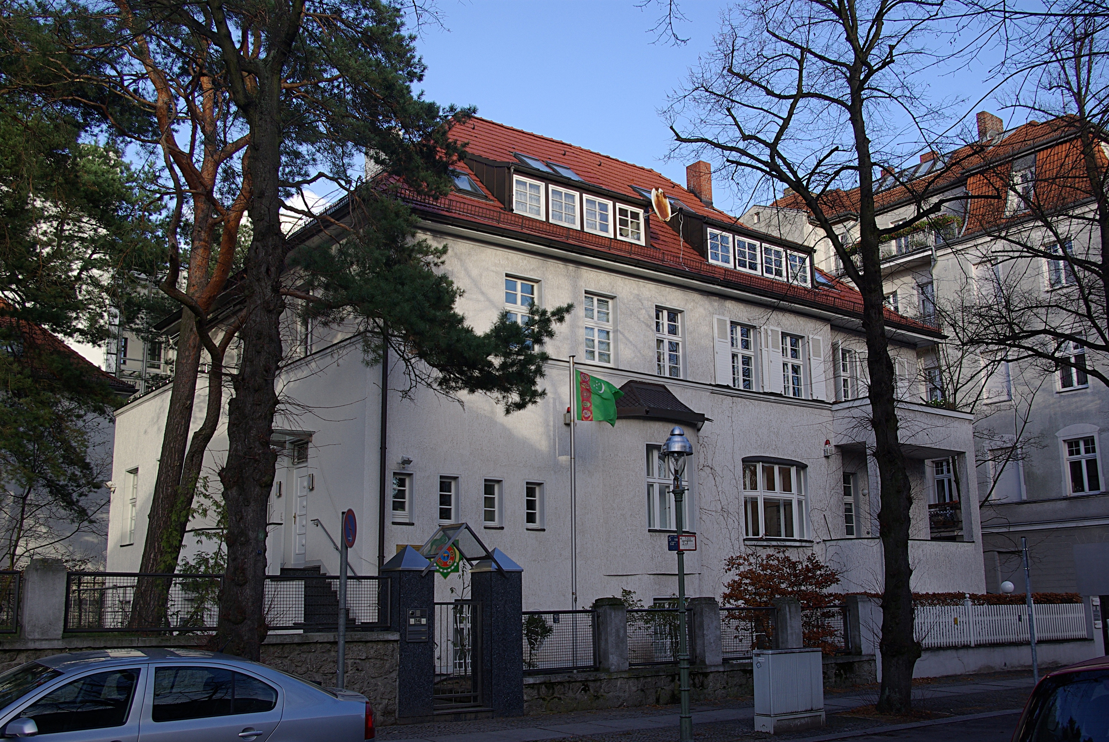 Die Botschaft von Turkmenistan in Berlin befand sich in der Langobardenallee Ecke Pommernallee in Berlin-Westend in der Nähe des Theodor-Heuss-Platz.